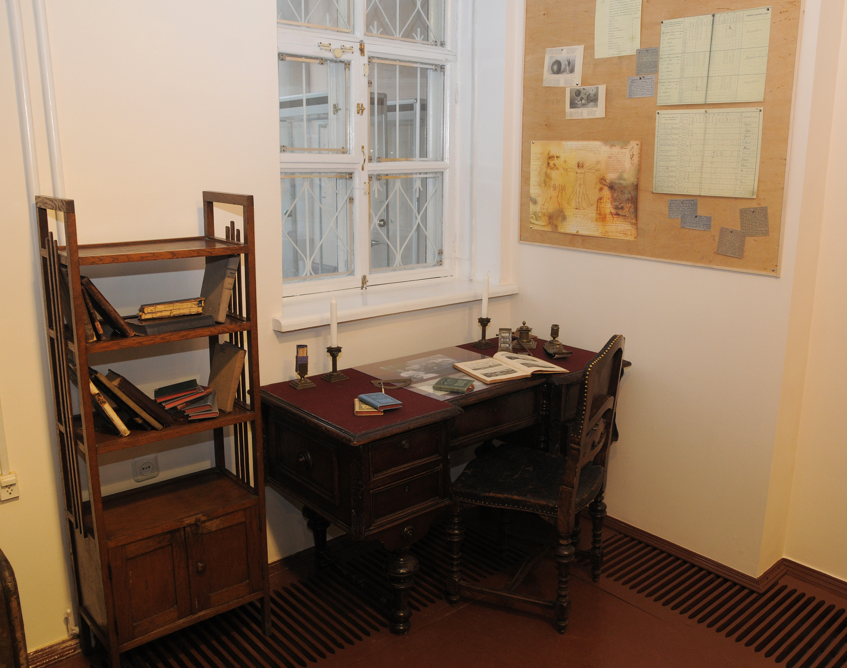 Фрагмент експозиції виставки "Наш Сікорський" в Музеї української діаспори